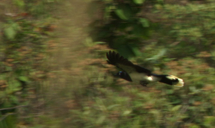 La urraca de pecho negro o carriquí pechiblanco (Cyanocorax affinis), es una especie de ave passeriforme perteneciente a la familia Corvidae. Se encuentra en Colombia, Costa Rica, Panamá y Venezuela. Su hábitat natural son los bosques subtropicales o tropicales secos, los bosques subtropicales o tropicales húmedos de las tierras bajas, y los bosques antiguos y muy degradados. En Colombia lo llaman "chau chau por su extraño canto.